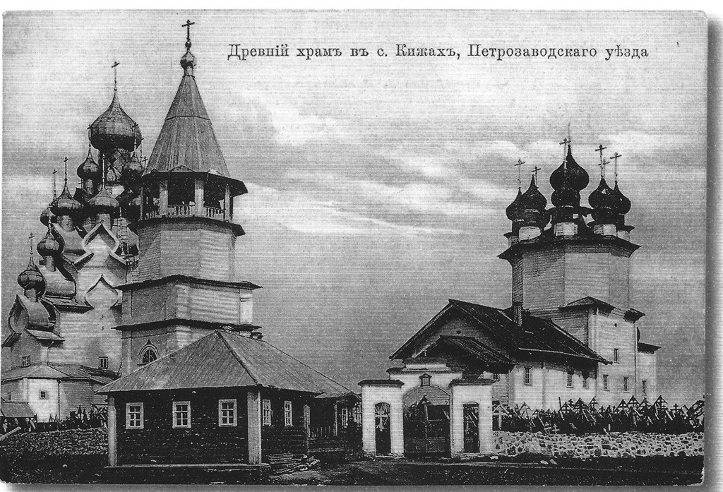 Кижский погост